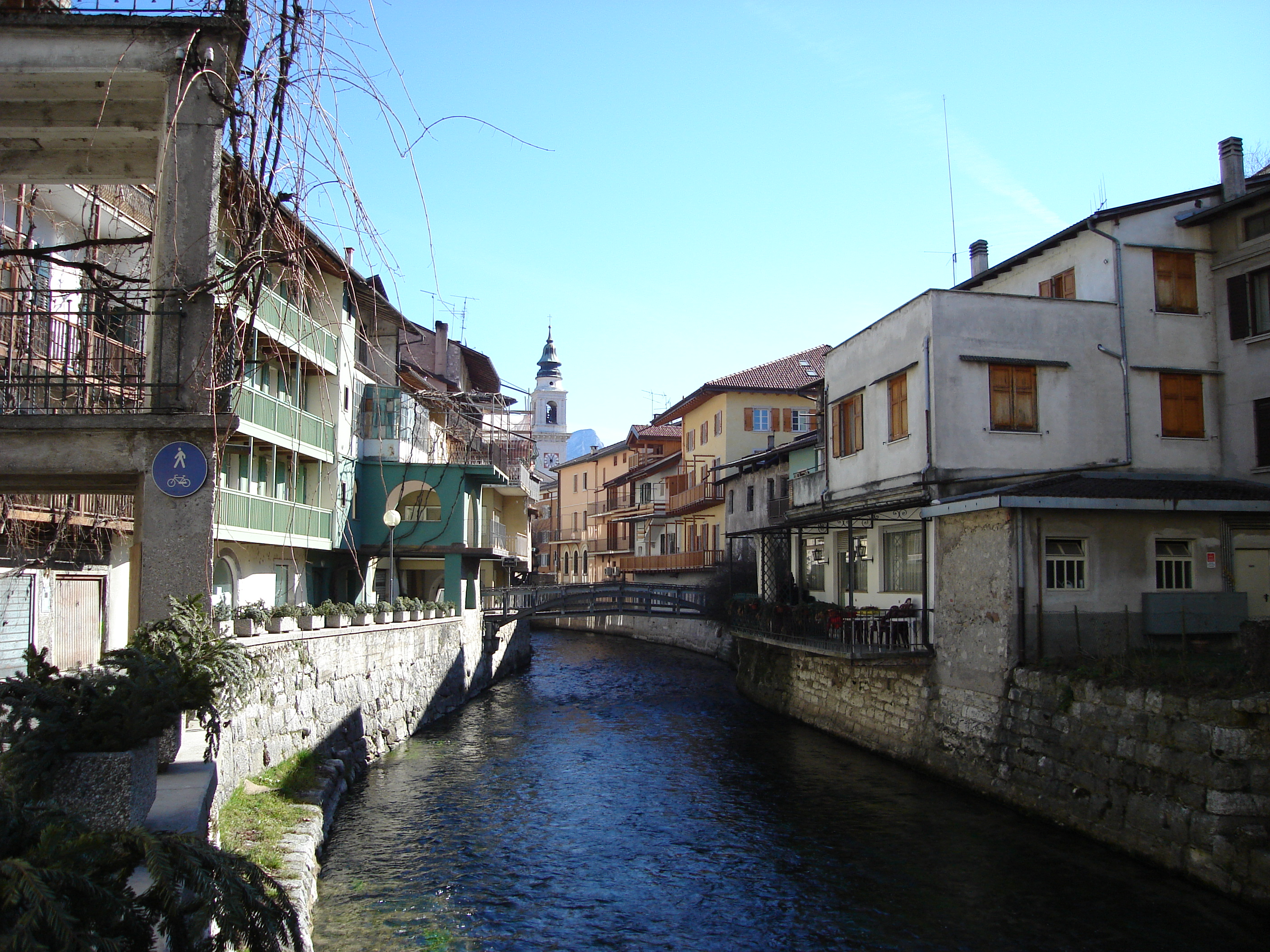 Fiume Brenta nel centro di Borgo Valsugana